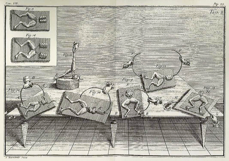 Caricatura de los experimentos realizados por Luigio Galvani